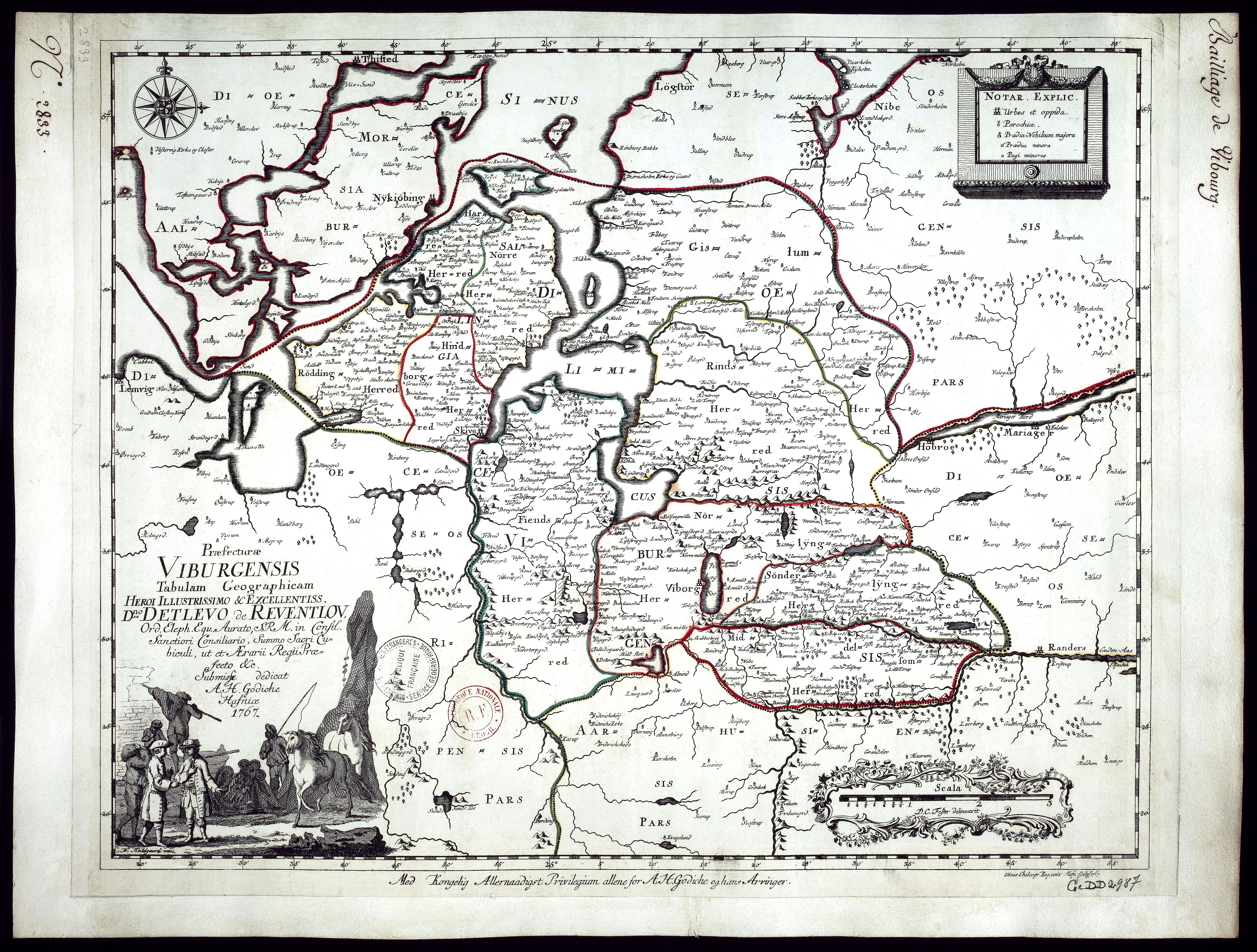 Praefecturae Viburgensis Tabulam Geographicam, carte du "Baillage de Vibourg" (Viborg, Danemark)